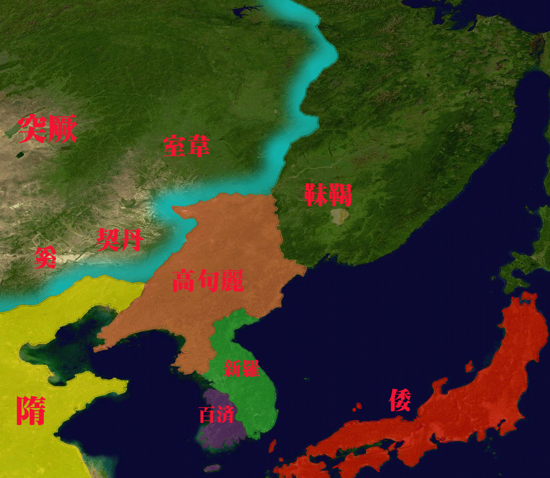 6世紀頃の東夷諸国。